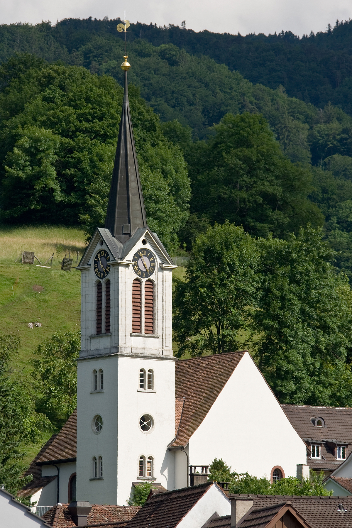 Reformierte Kirche in Reigoldswil (BL)